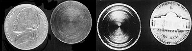 Sichergestellte Münze (hohl) von Rudolf Abel